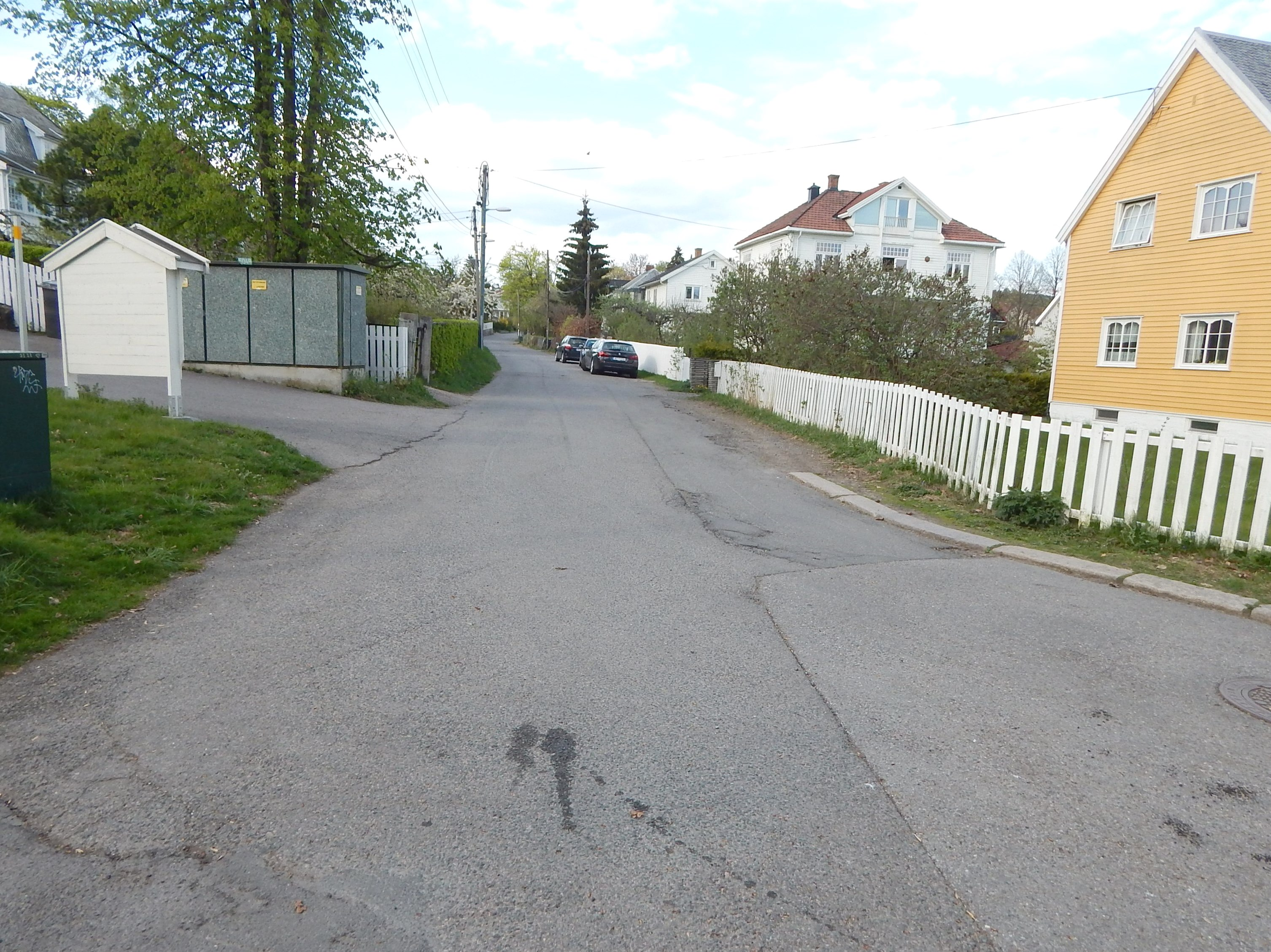 Bakkehaugveien nordøst for Bakkehaugen kirke